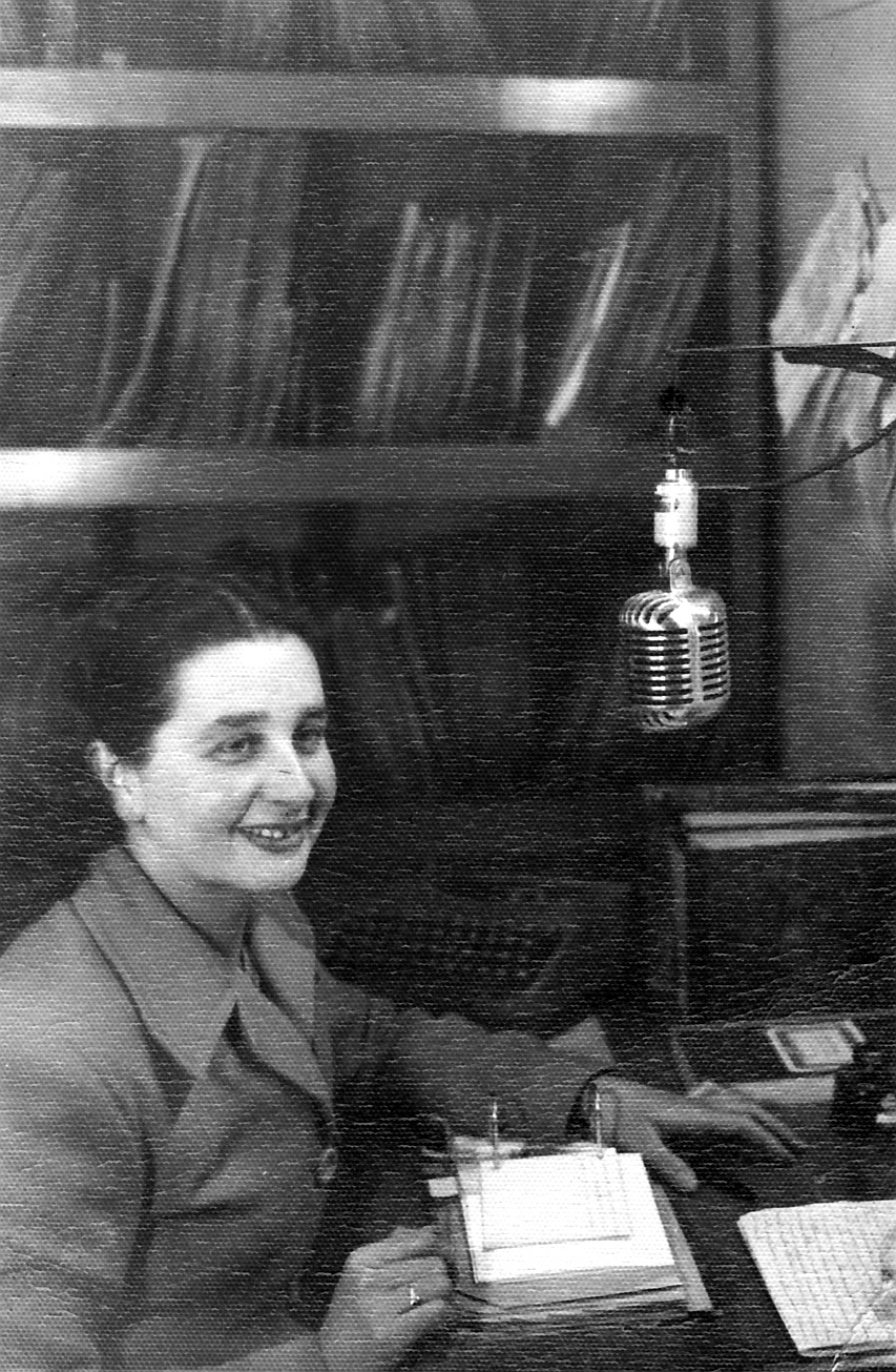 Alicia Cervera Torres at the radio studio, 10th Yungay Street, Curicó, Chile (1950's decade)